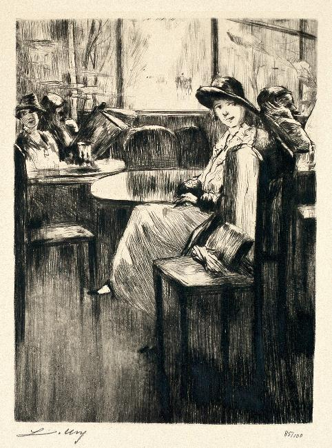 Junges Mädchen im Kaffee mit Straßenblick